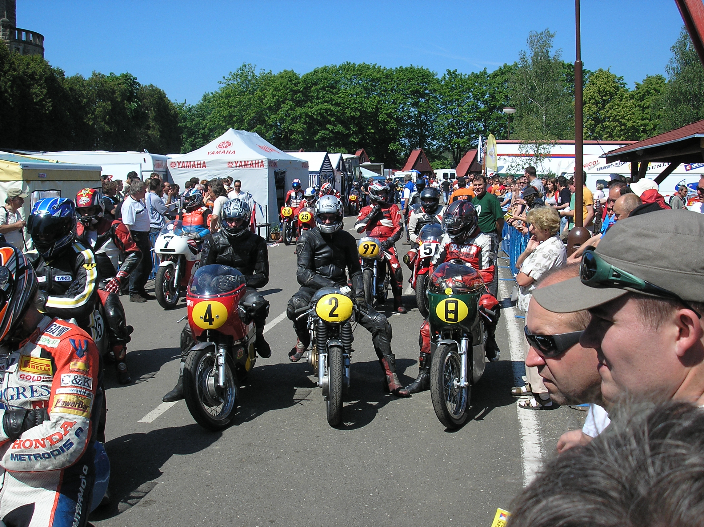 depo závodních strojů